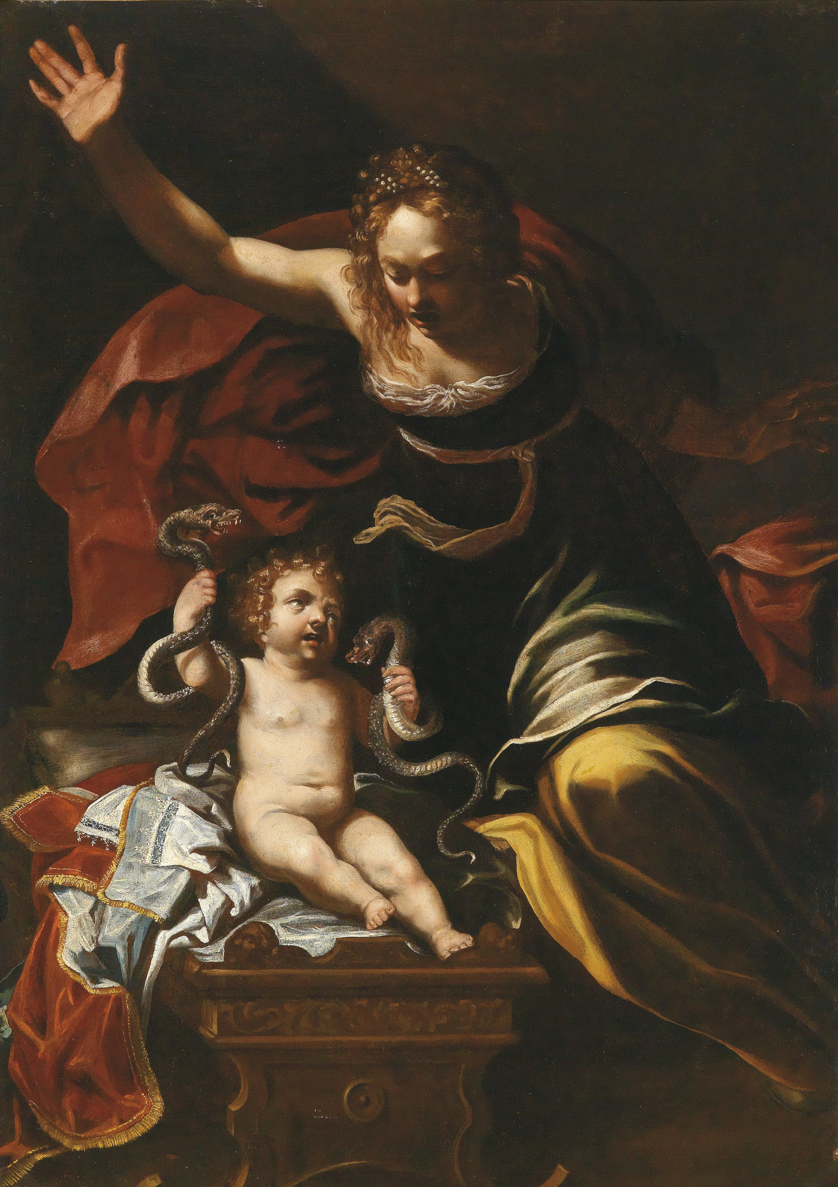 Szene aus der Kindheit des Herkules; Öl auf Leinwand, 135 x 96 cm